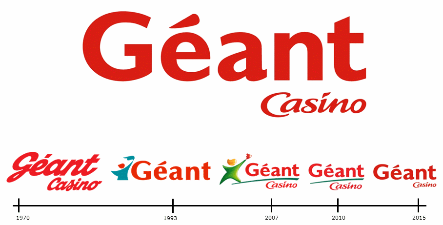 Evolution du logo Géant Casino depuis 1970